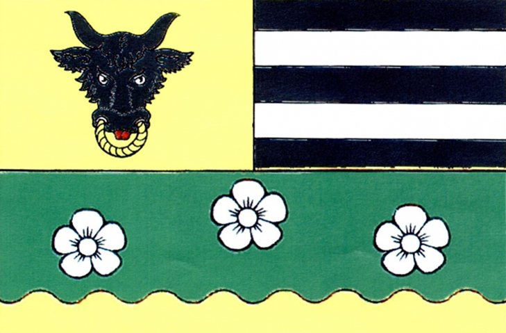 vlajka, Strachujov, okres Žďár nad Sázavou